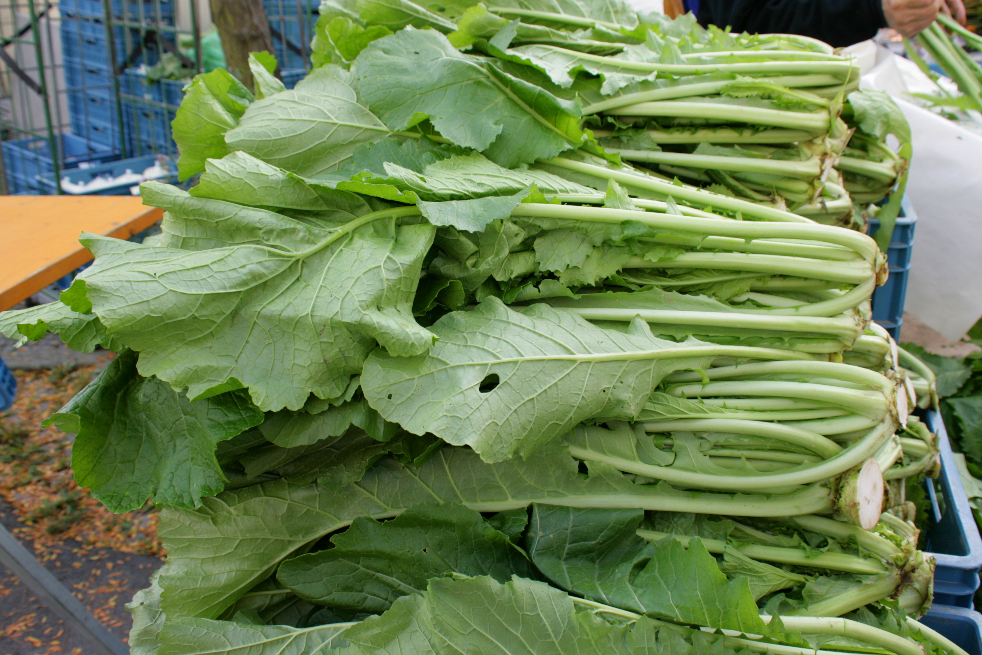 Bauernmarkt in Remscheid-Lüttringhausen